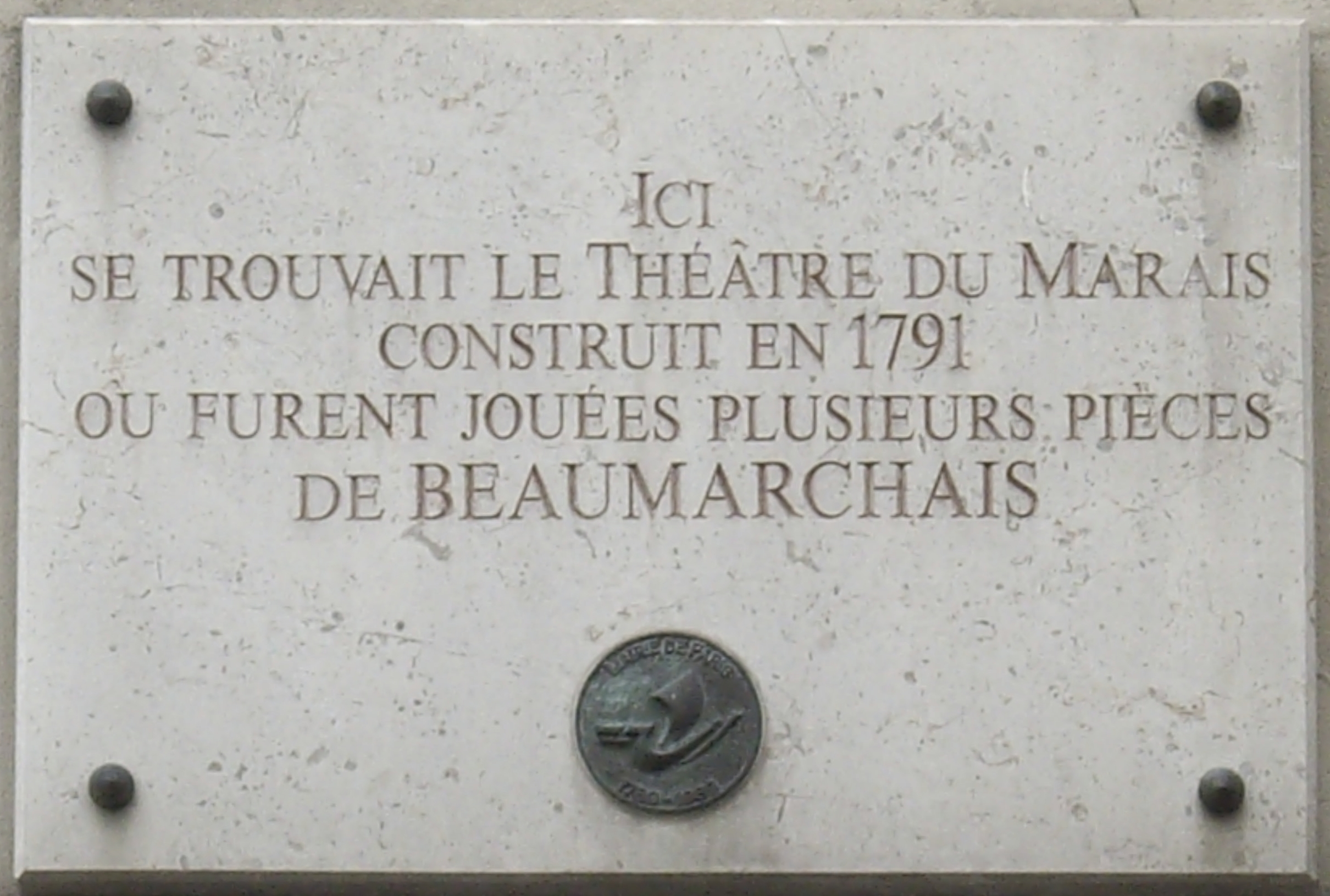 Plaque commémorative, 11 rue de Sévigné, Paris 4e. « Ici se trouvait le Théâtre du Marais, construit en 1791, où furent jouées plusieurs pièces de Beaumarchais. »